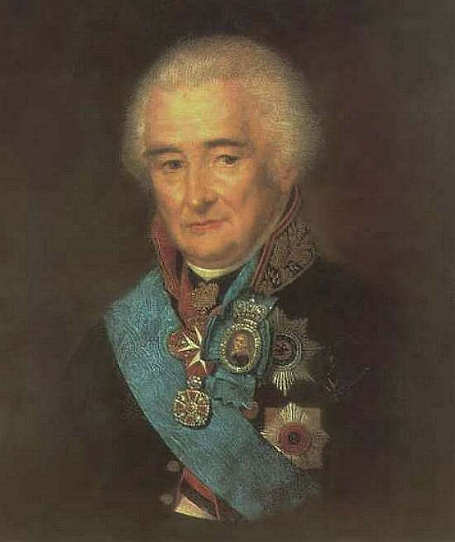 Щукин Степан Семенович. Портрет П.В.Лопухина. 1801г.